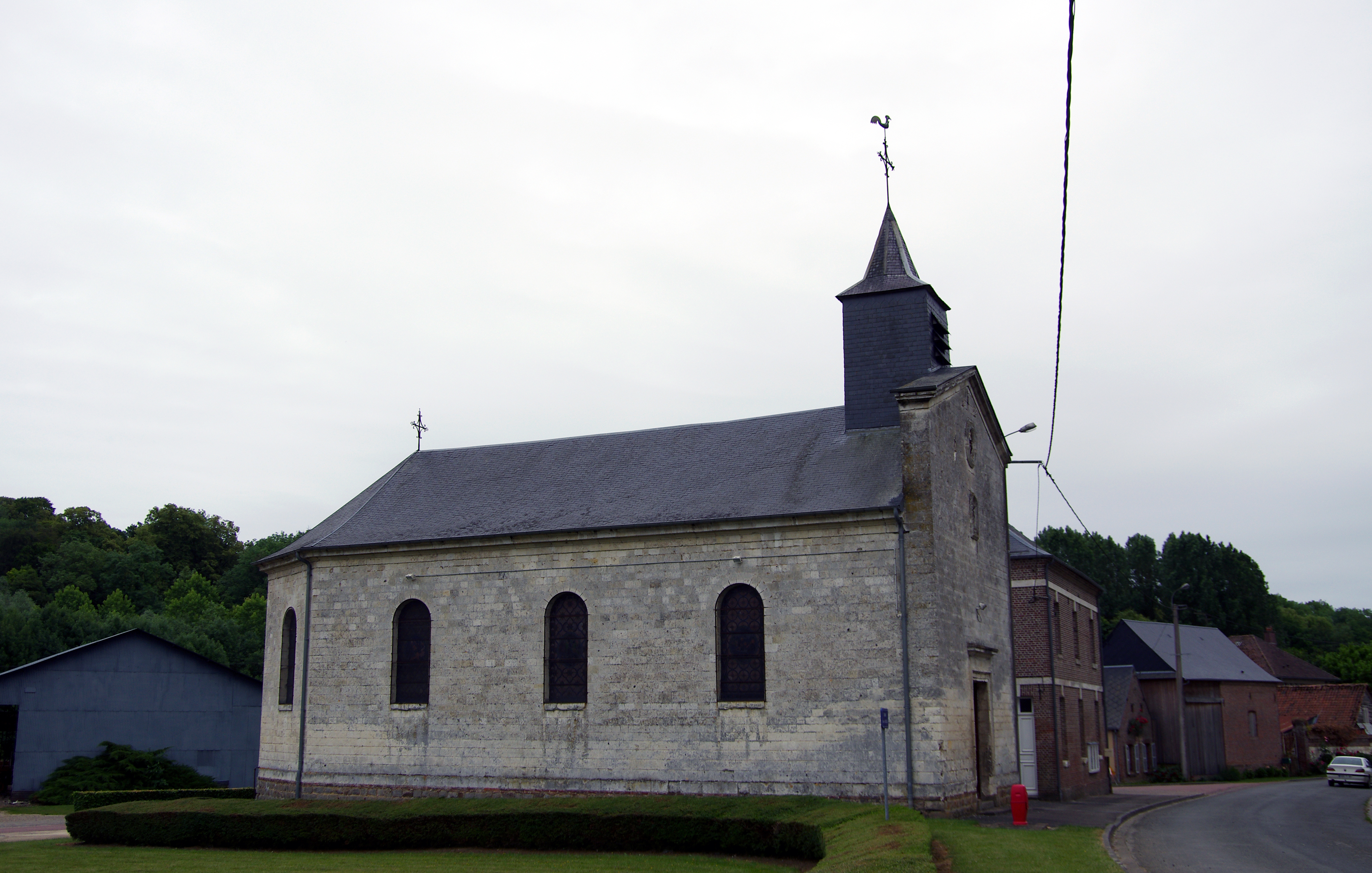 Marieux (Somme, France) - L'église. .